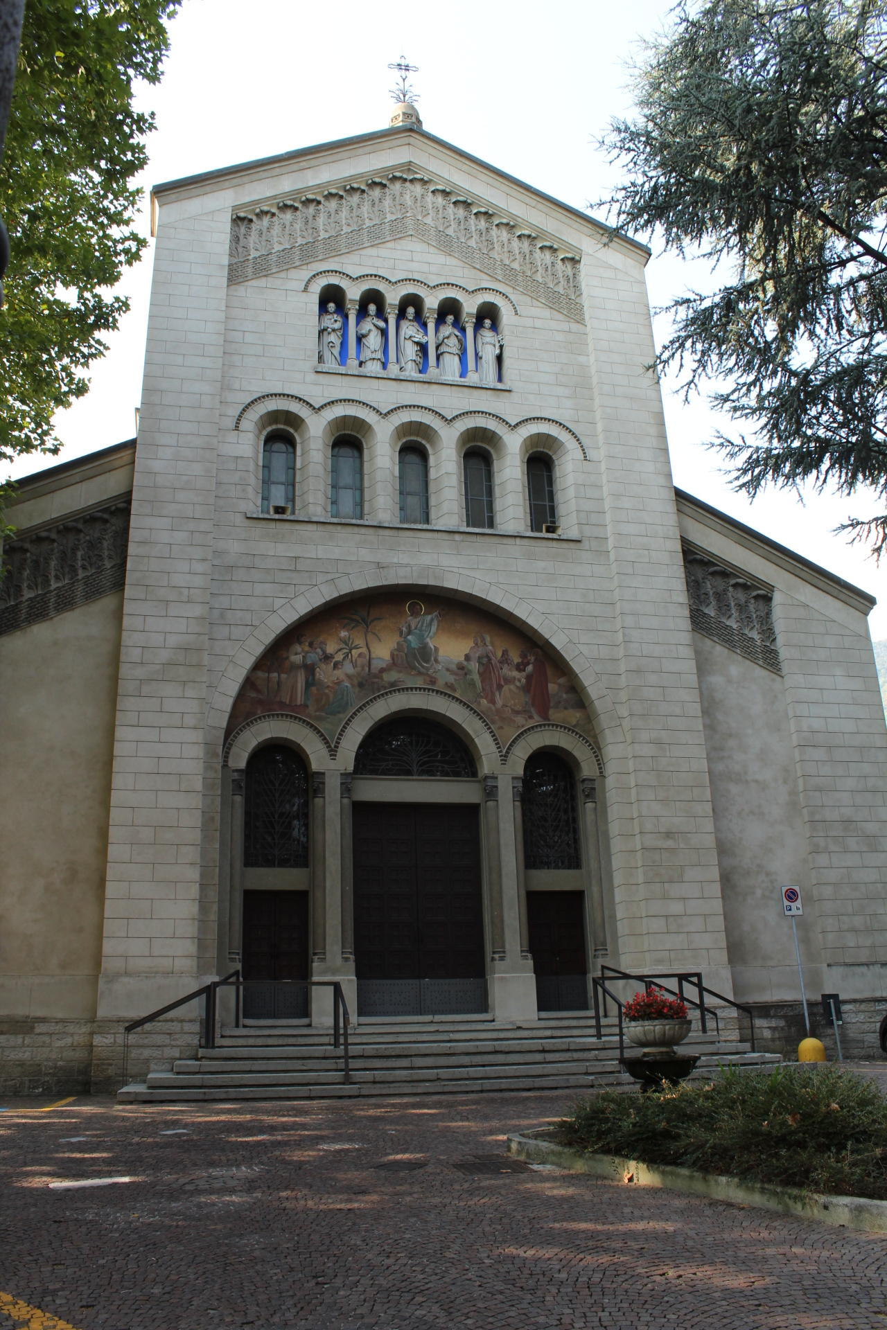 chiesa del Santissimo Redentore This is a photo of a monument which is part of cultural heritage of Italy.